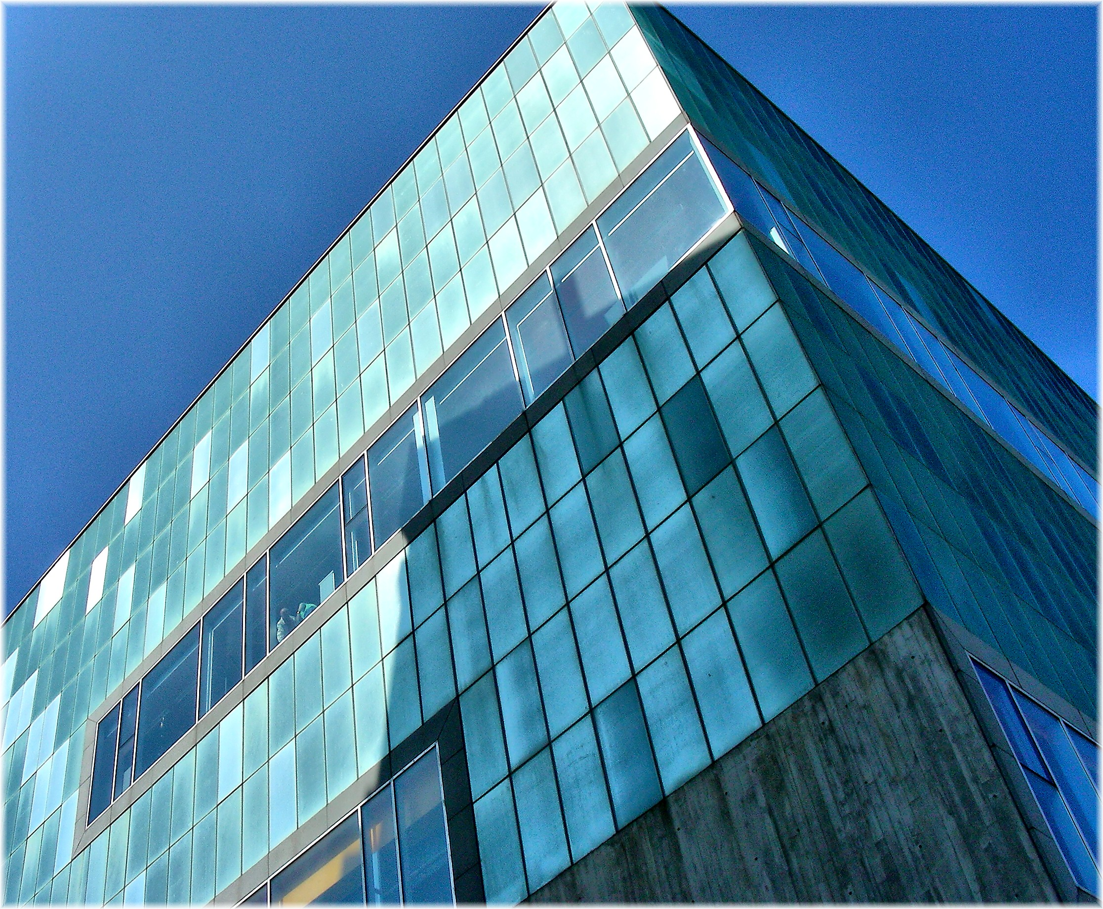 Museo Nacional de Ciencia e Tecnoloxía, no paseo maritimo de A Coruña.